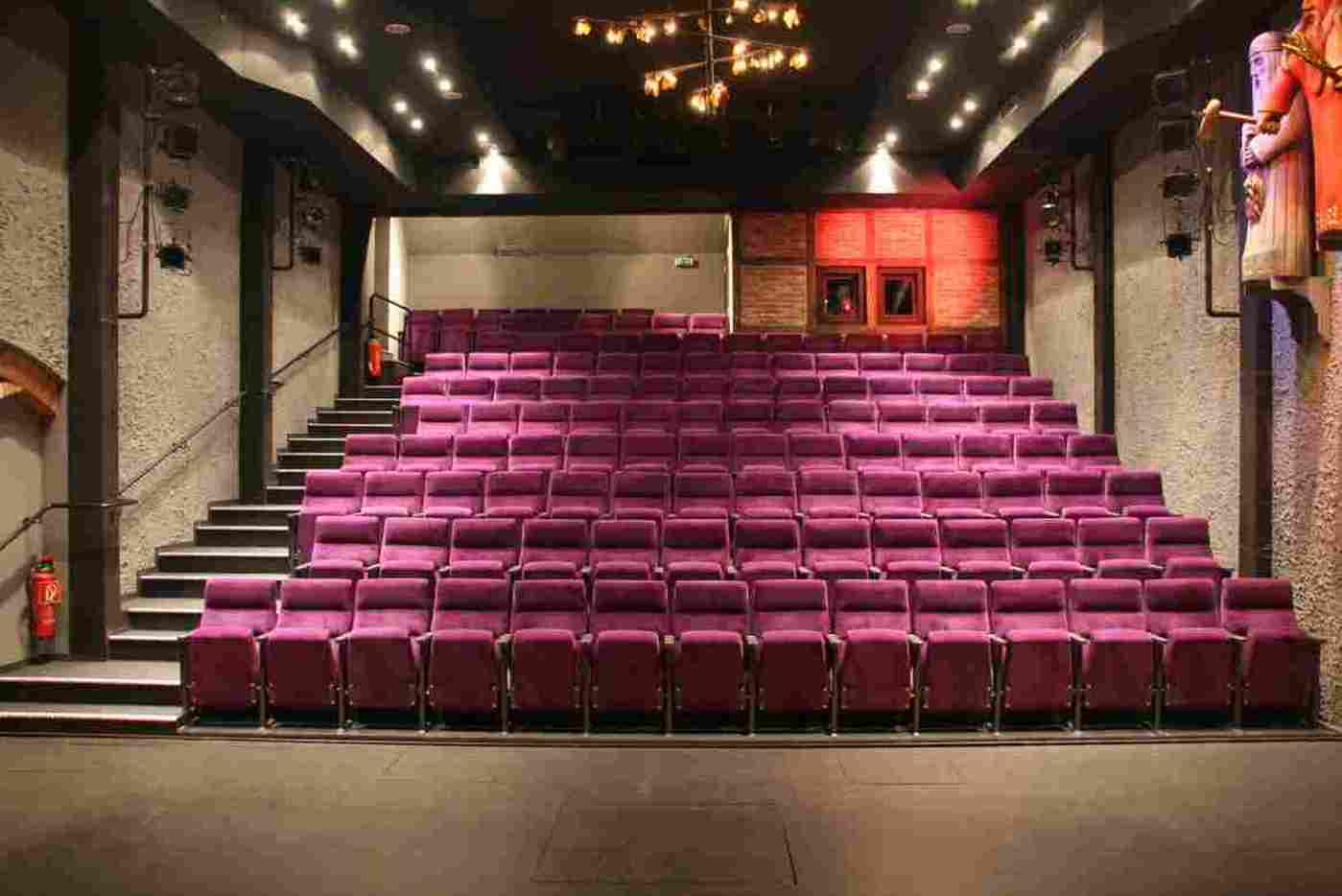 Das Theater - Dittchednbühne